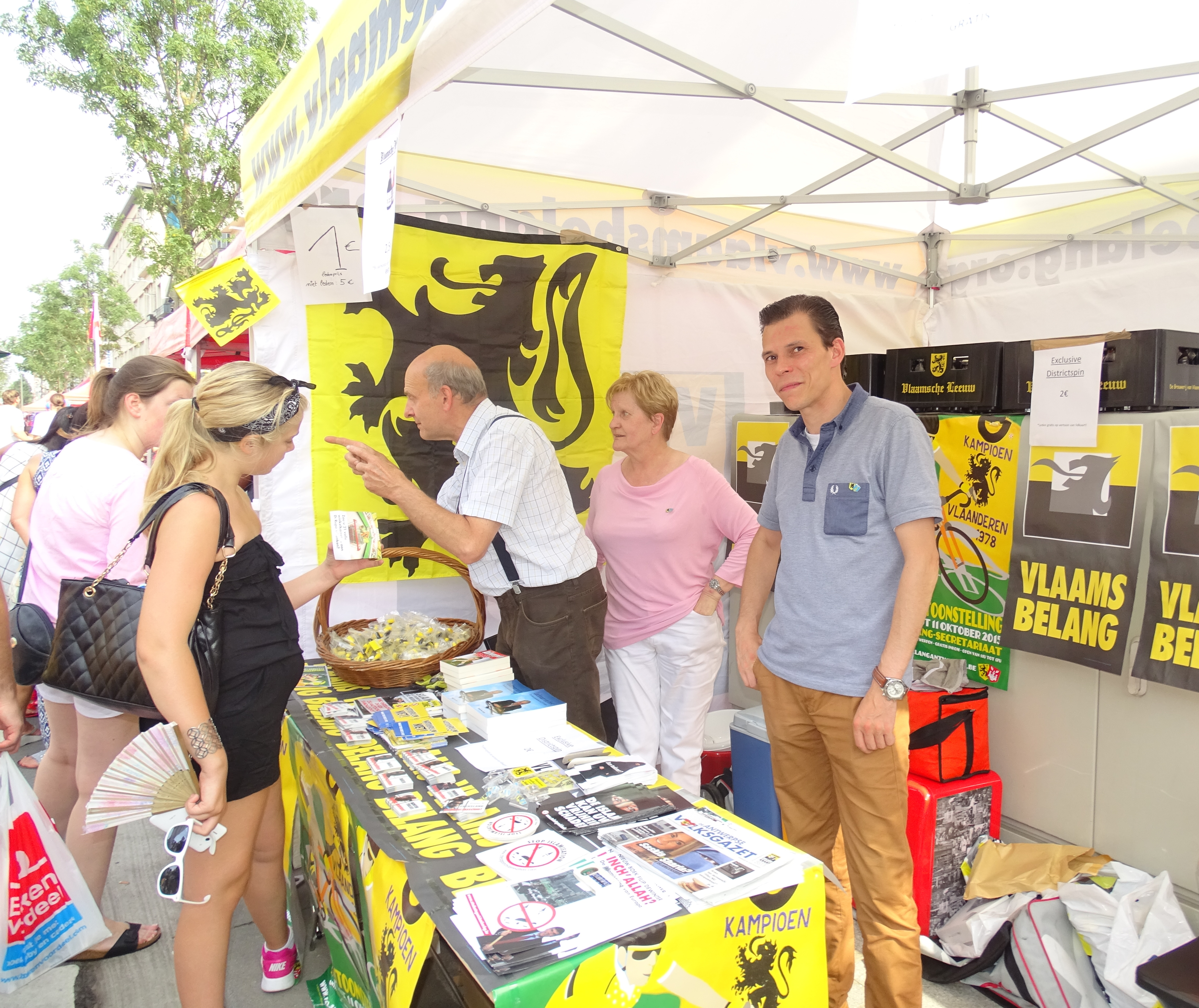 Reportage réalisé le dimanche 30 août à l'occasion du départ et de l'arrivée de la Coupe Sels 2015 à Merksem (Anvers), Belgique.